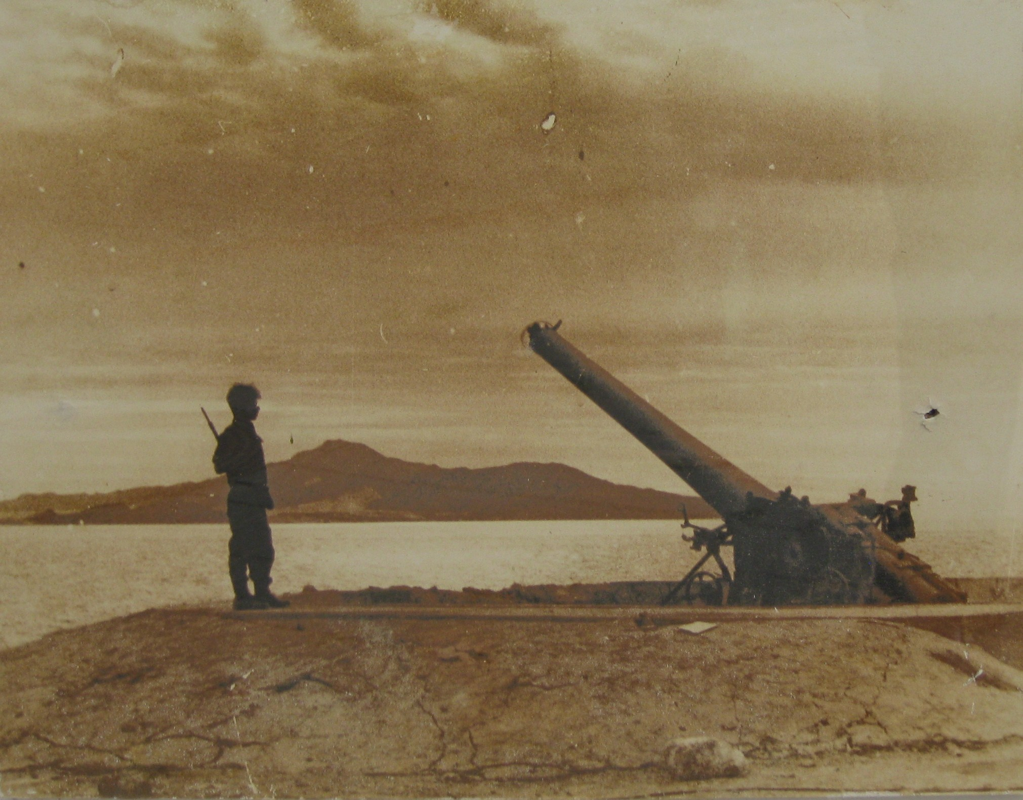 Tiran Guns מוזיאון בתי האוסף - תותחי טירן